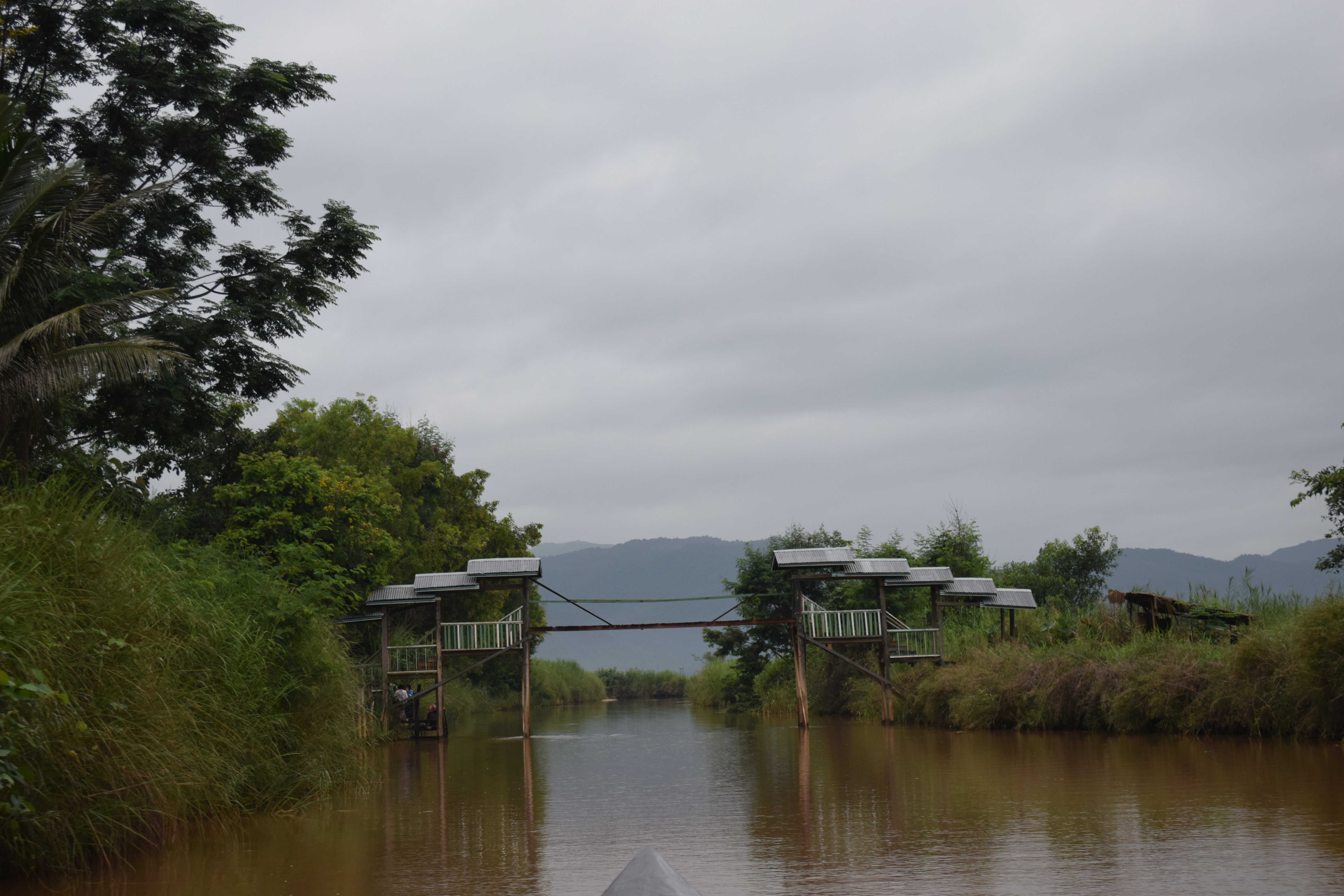 Go to Shwe Inn Tian Paya By boat